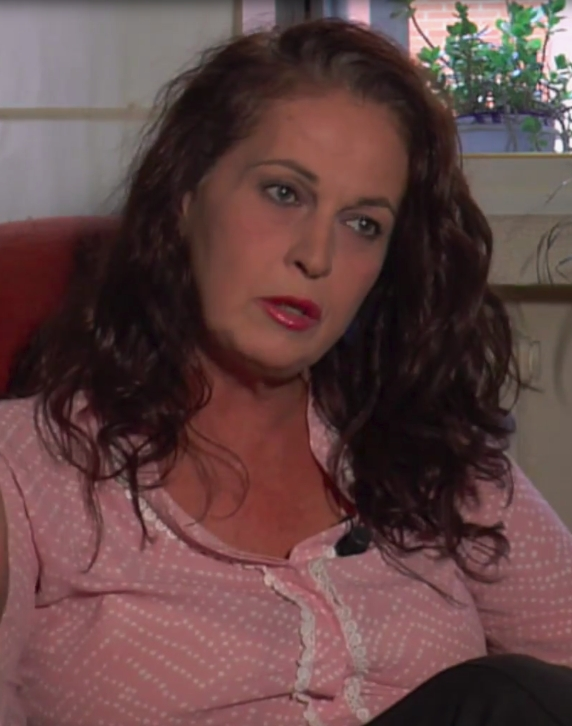 Activista, Diputada del PSOE en la Asamblea de Madrid. Responsable en temas LGTBI , Familias, Menores y Comisión de Cultura.